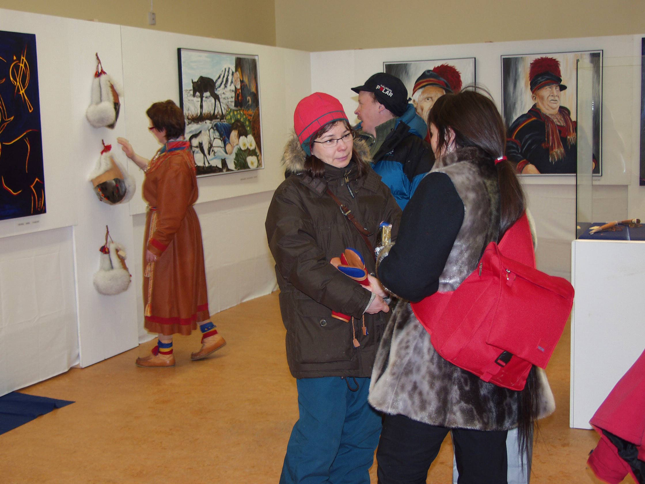 Kunstausstellung beim Jokkmokksmarkt 2005